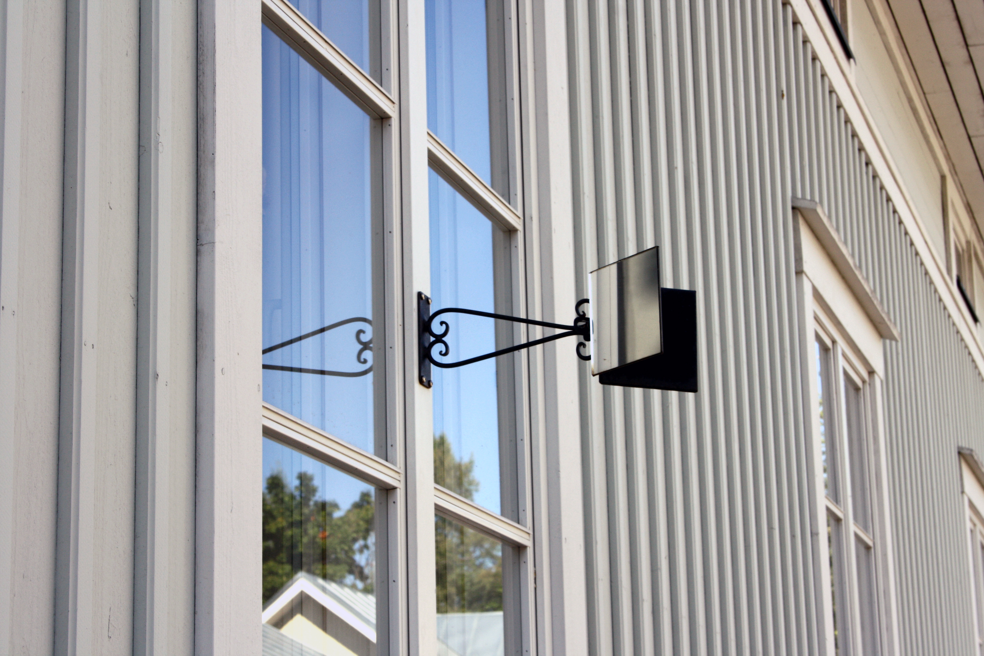 Katupeili (juorupeili) Kokkolan vanhassa kaupungissa, Suomessa.